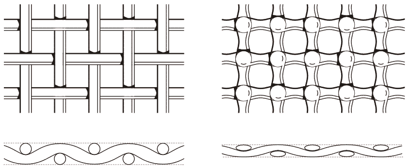 Corte esquemático de um tecido sem calandrar e calandrado.